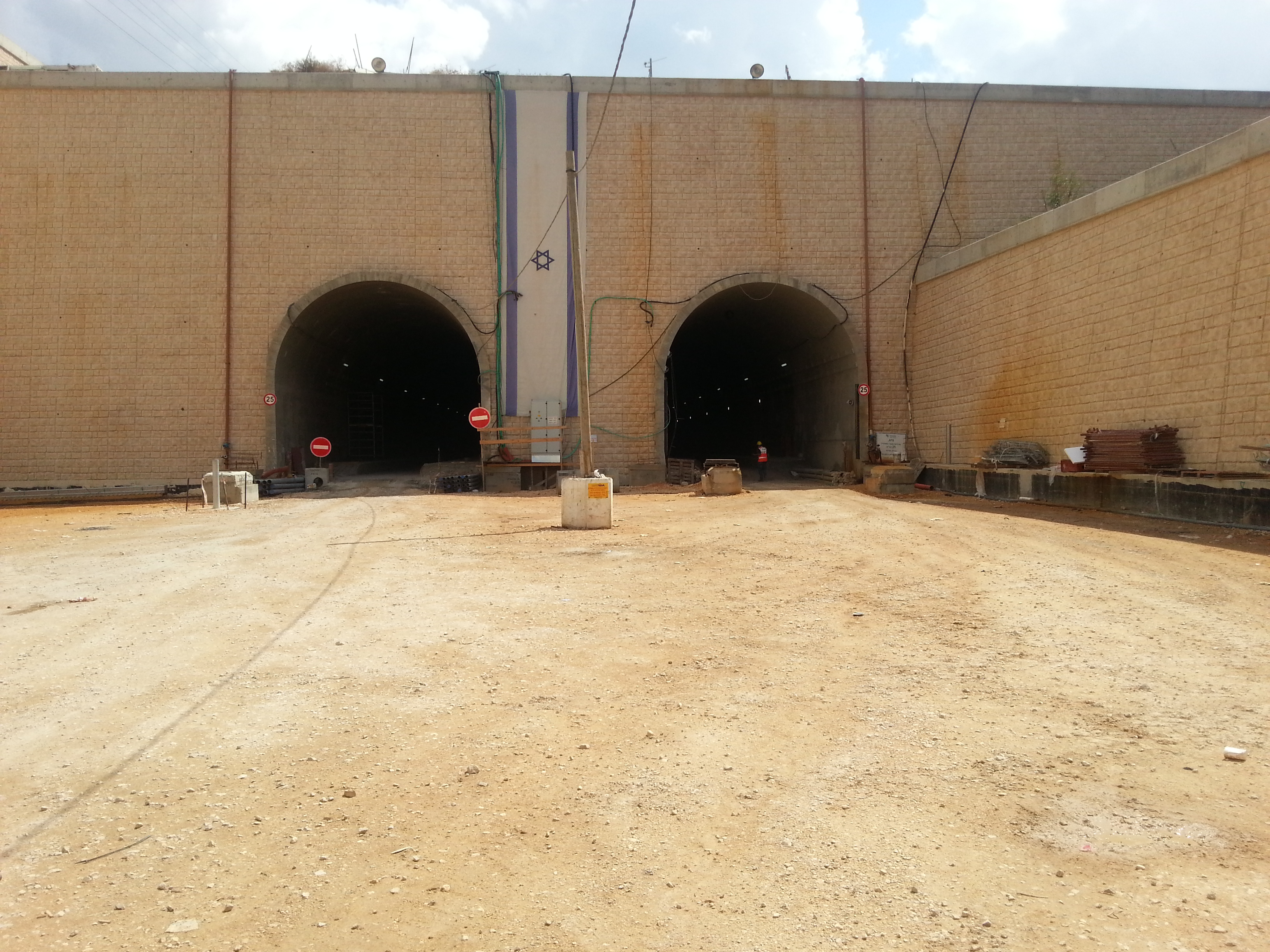 מנהרות גילון, כניסה מערבית 2015